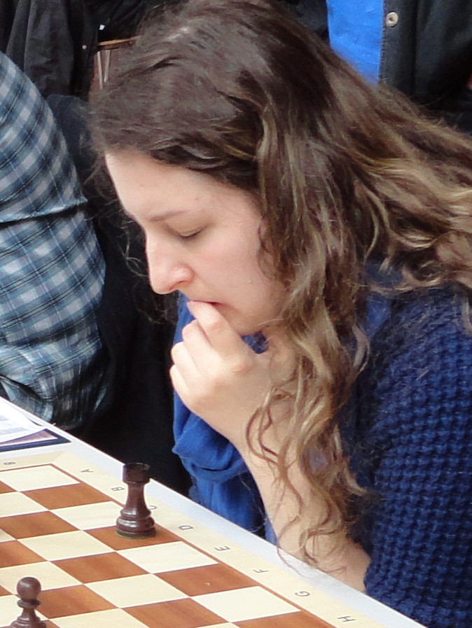 Inna Agrest, Grenke Chess Open 2016 in Karlsruhe.